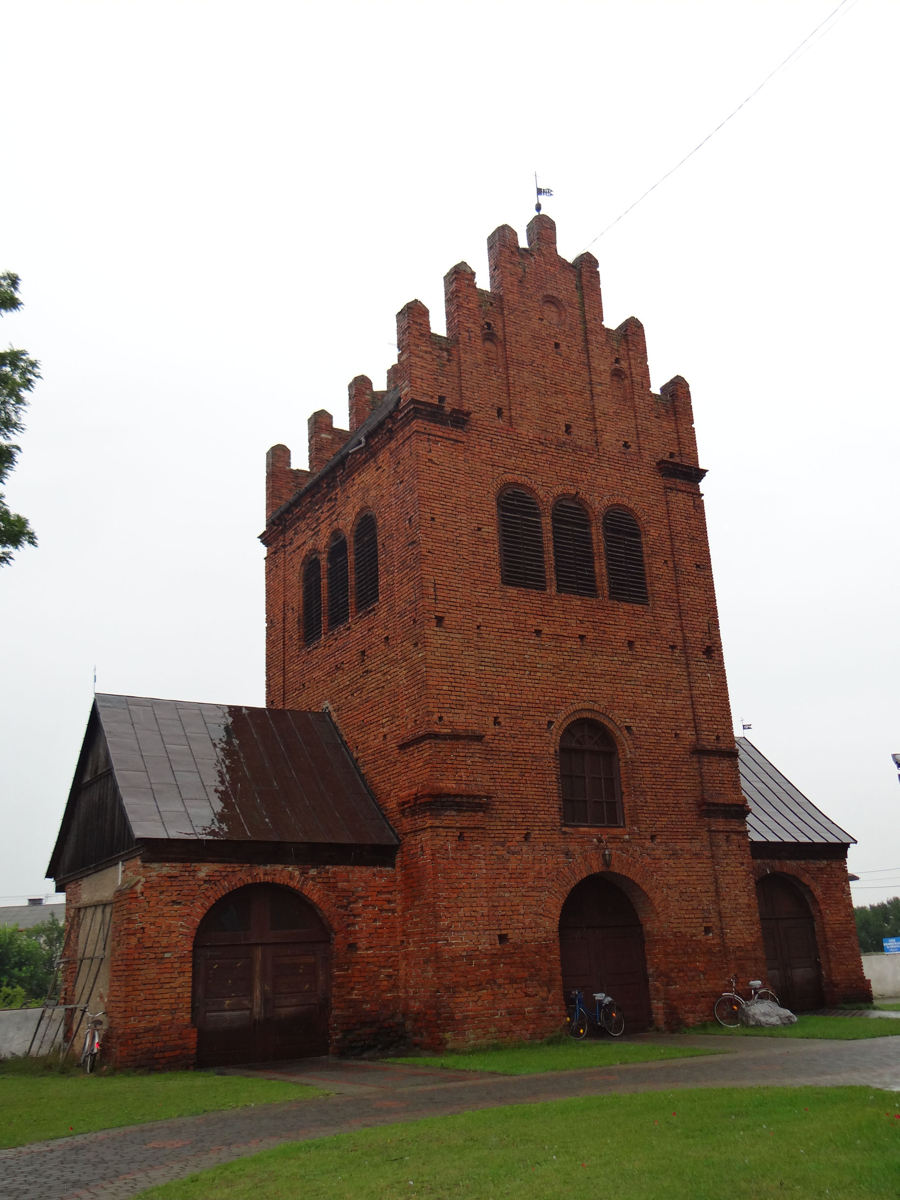 Dzwonnica kościoła Świętej Trójcy w Myszyńcu